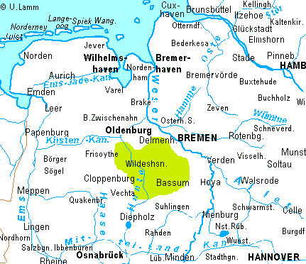 Naturpark Wildeshauser Geest, Lage im regionalen Kontext